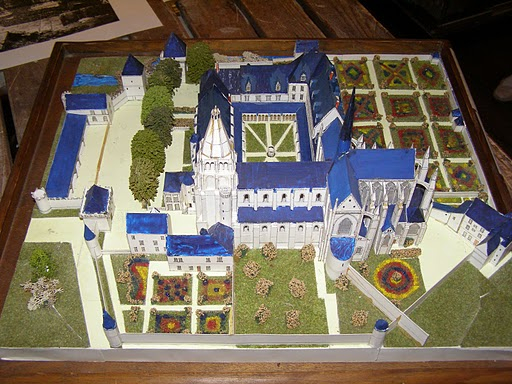 Maquette de l'abbaye de Cormery